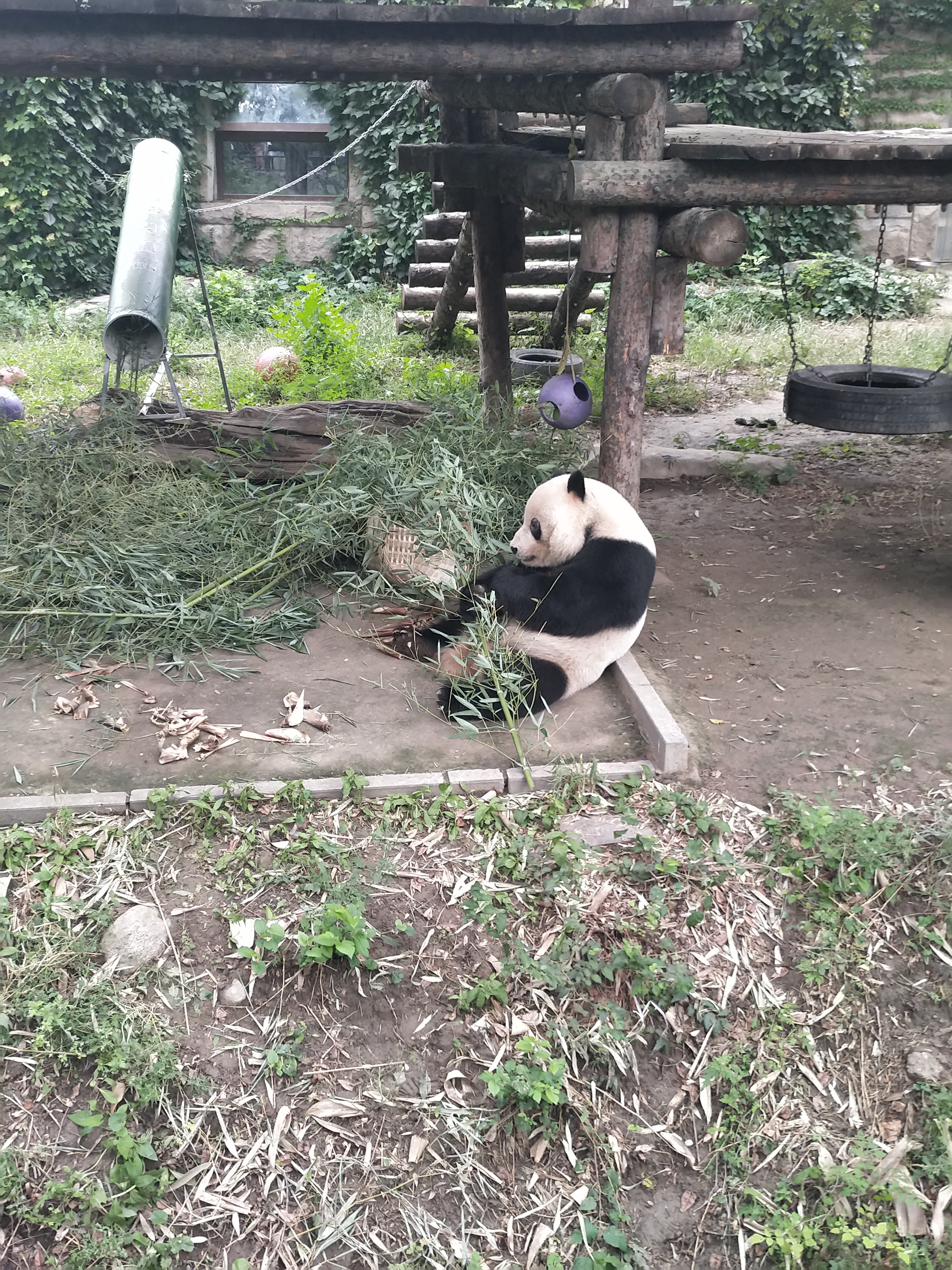 中文（中国大陆）: 大熊猫古古